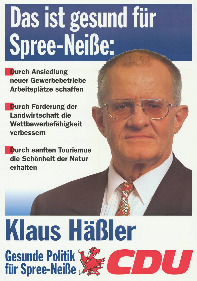 Das ist gesund für Spree-Neiße: . Durch Ansiedlung neuer Gewerbebetriebe Arbeitsplätze schaffen . Durch Förderung der Landwirtschaft die Wettbewerbsfähigkeit verbessern - Durch sanften Tourismus die Schönheit der Natur erhalten Klaus Häßler Gesunde Politik für Spree-Neiße CDUAbbildung:PorträtfotoPlakatart:Kandidaten-/Personenplakat mit PorträtObjekt-Signatur:10-033 : 235Bestand:Landtagswahlplakate Brandenburg (10-033)GliederungBestand10-18:Landtagswahlplakate Brandenburg (10-033) » CDULizenz:KAS/ACDP 10-033 : 235 CC-BY-SA 3.0 DE